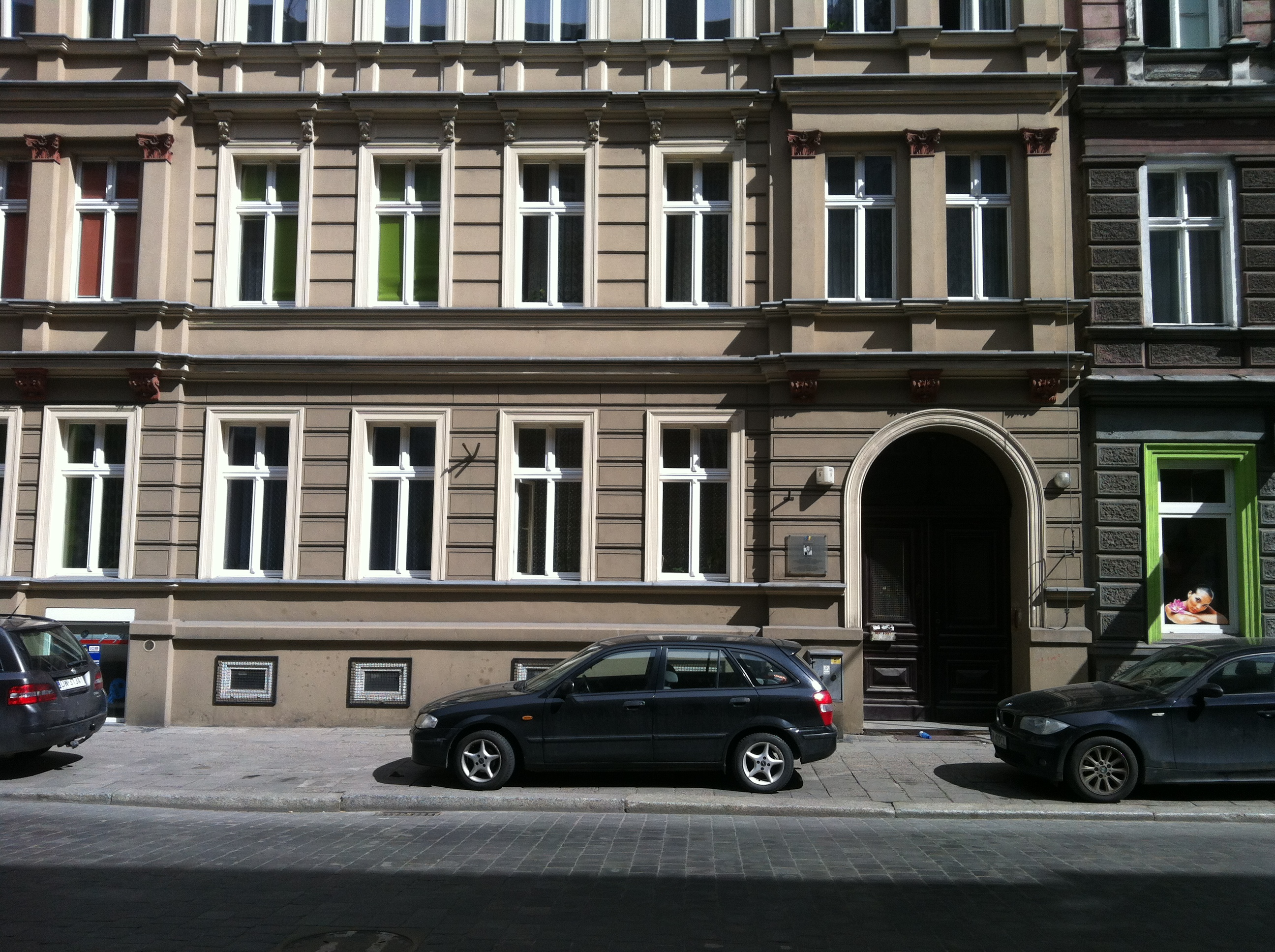 Kamienica, w której mieszkała Anna German przy ul. Trzebnickiej 5 we Wrocławiu